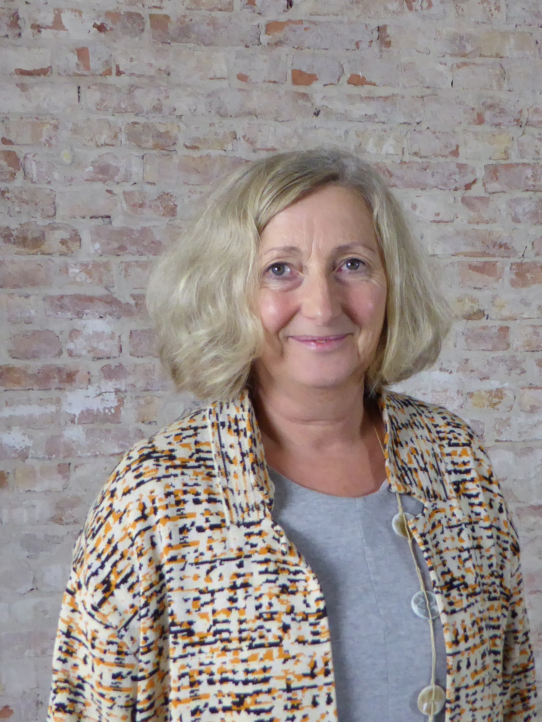 Kornelia (Konny) Gellenbeck während der Generalversammlung 2015 der taz Genossenschaft